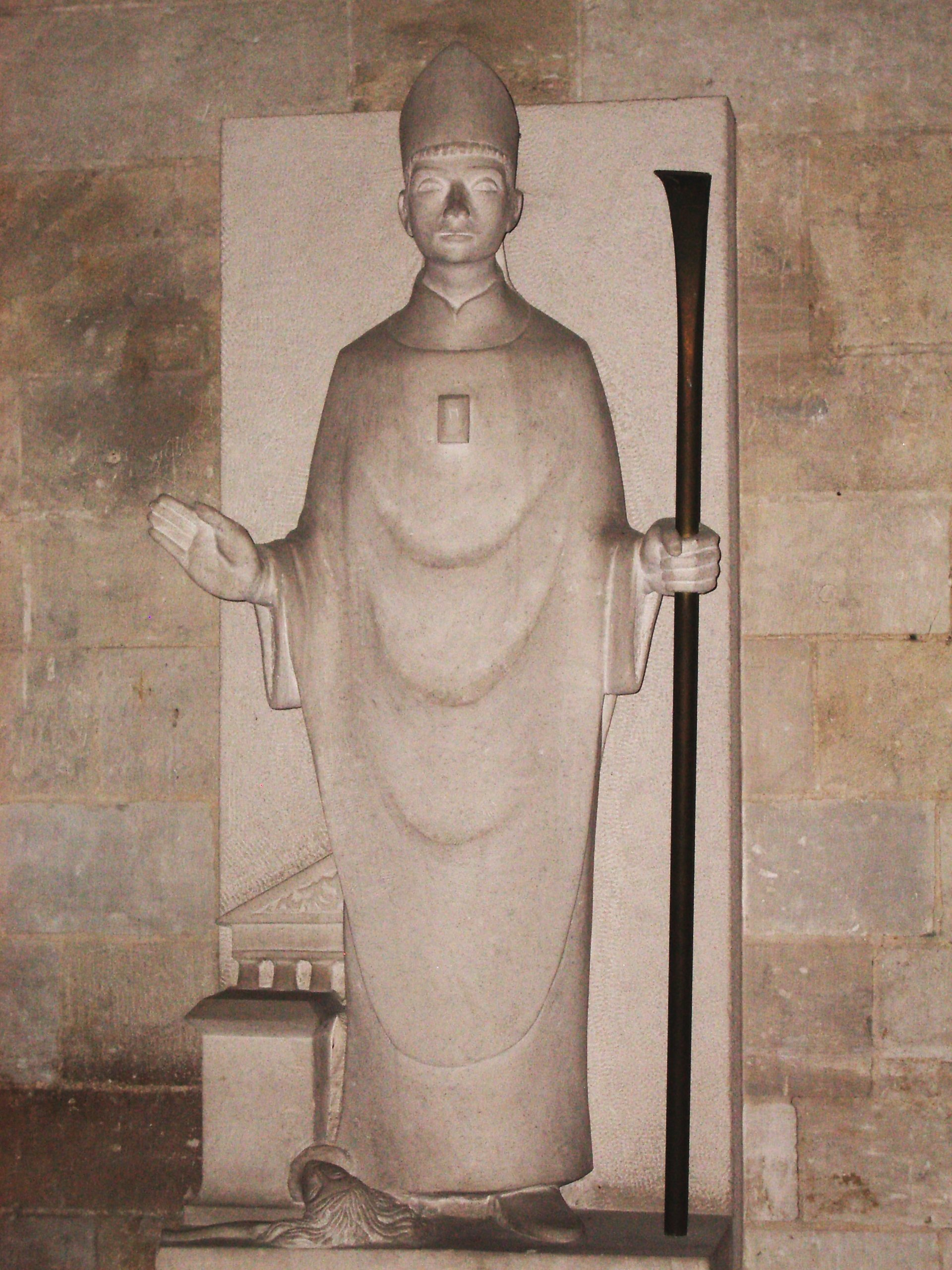 Représentation moderne de Saint Taurin (par Gérard Vincent) dans l'église Saint Taurin d'Évreux